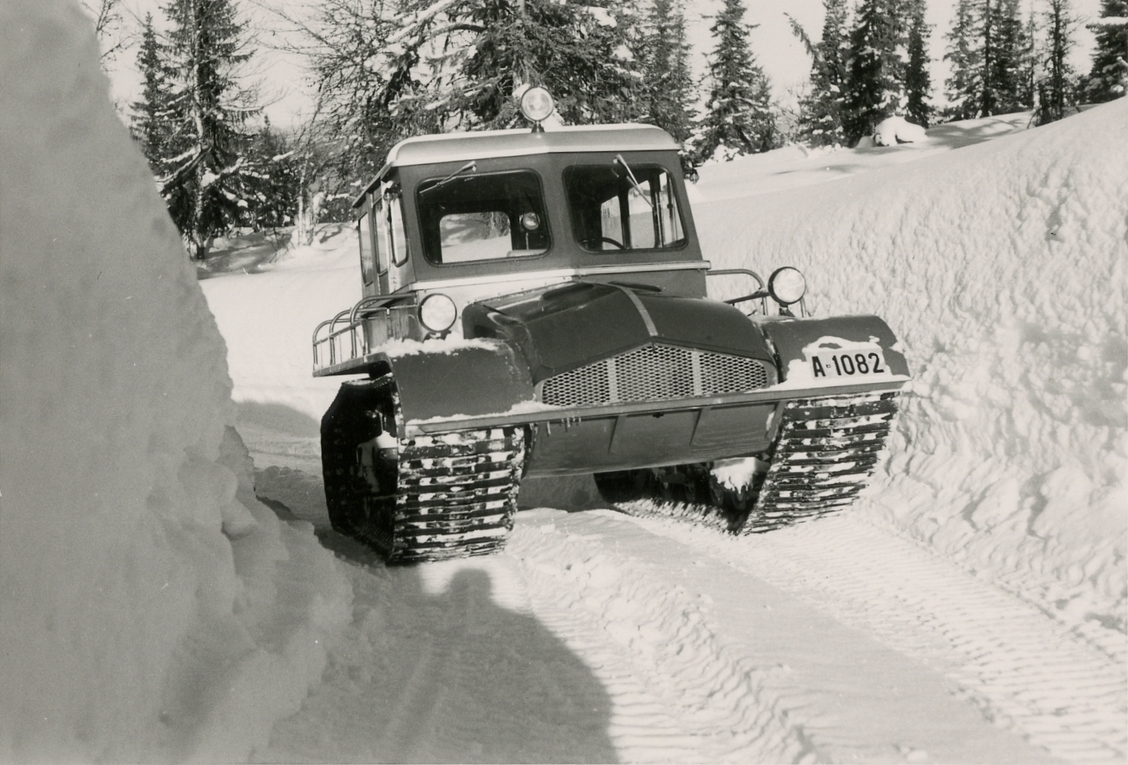 Snow-Trac beltebil